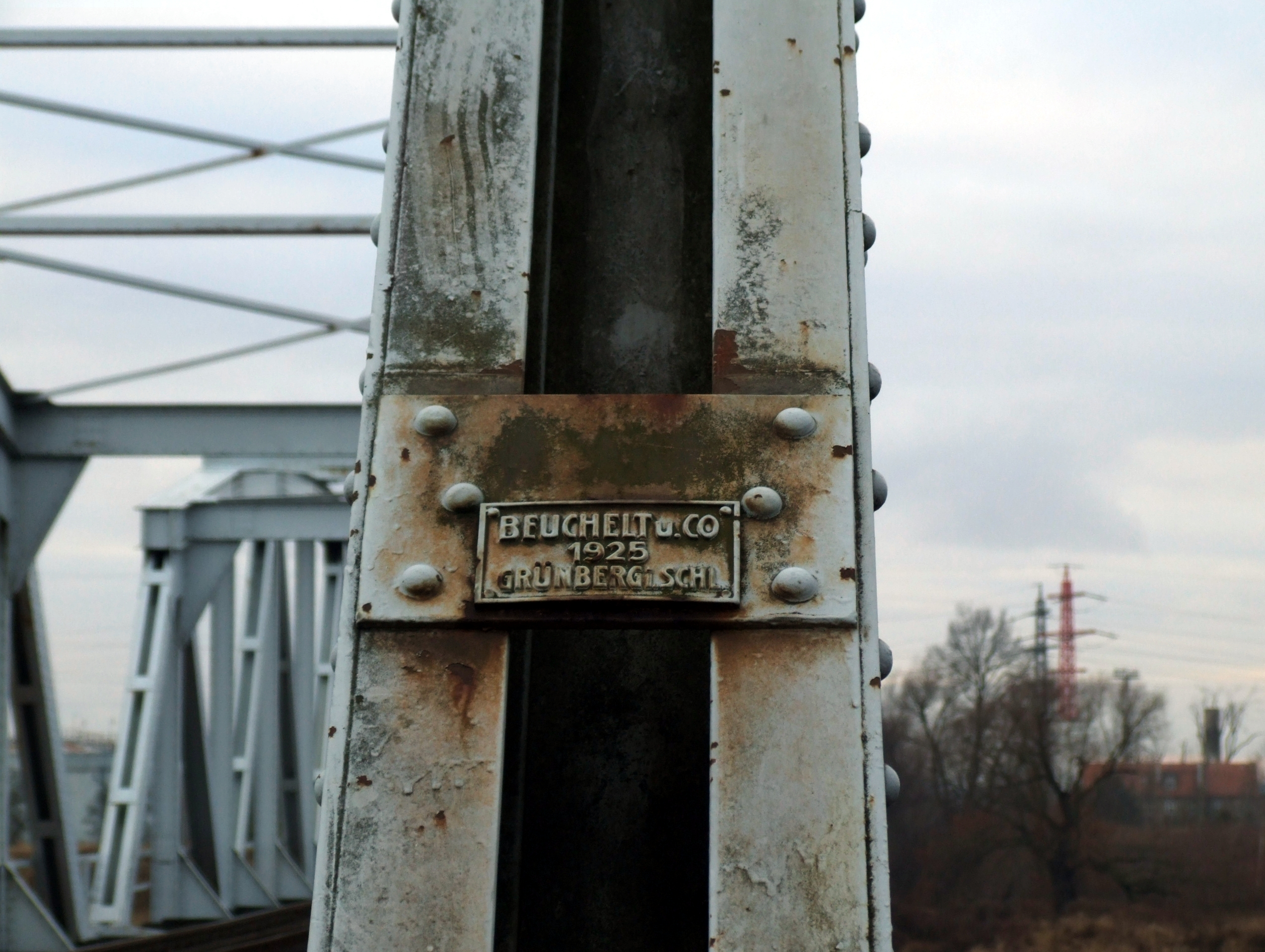 Tablica z nazwą producenta na moście kolejowym w Koźlu (Cosel)